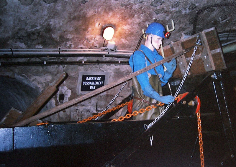 Egouts de Paris